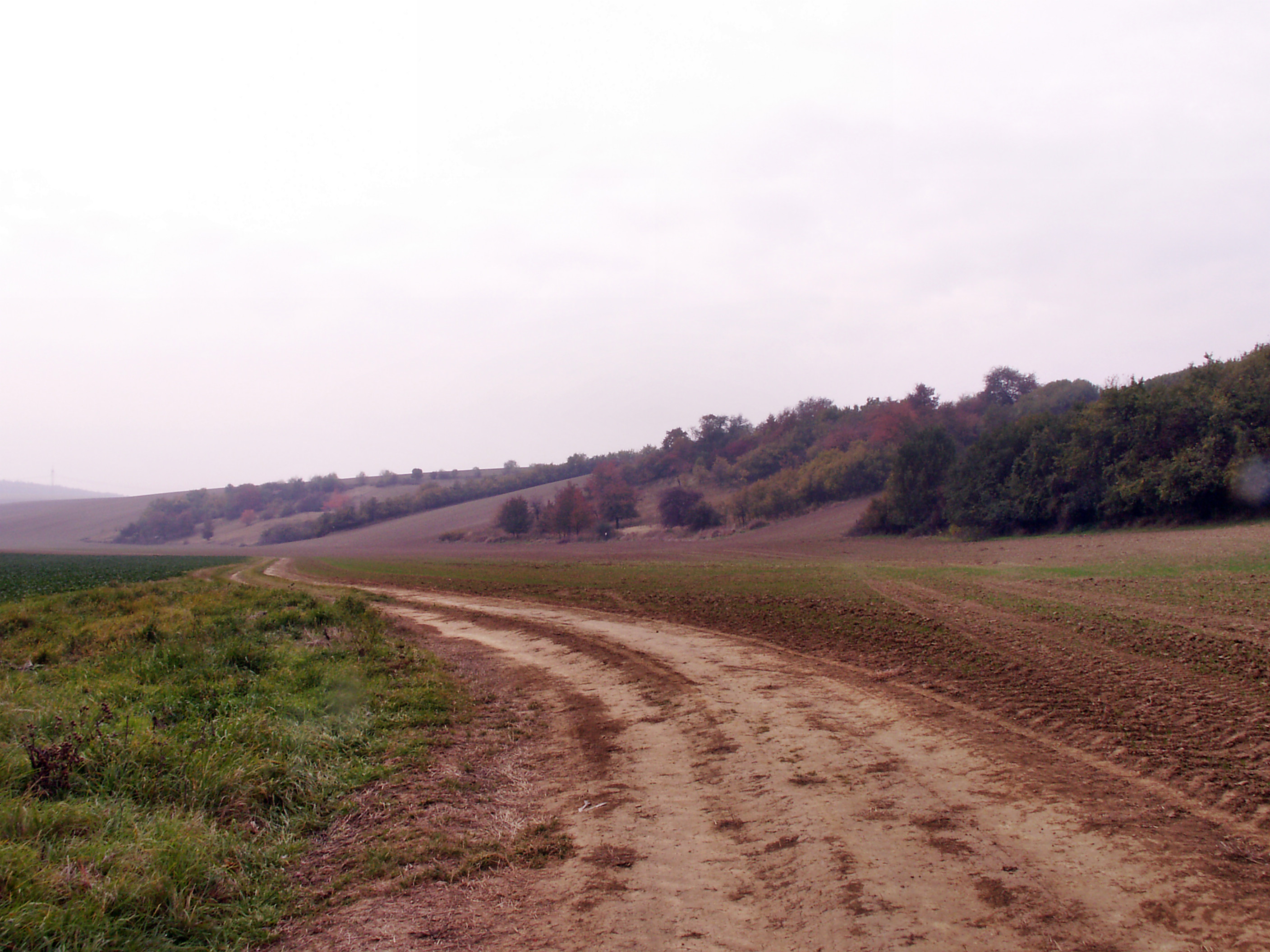 přírodní památka Žlíbek, lokalita Rašovice, okres Vyškov